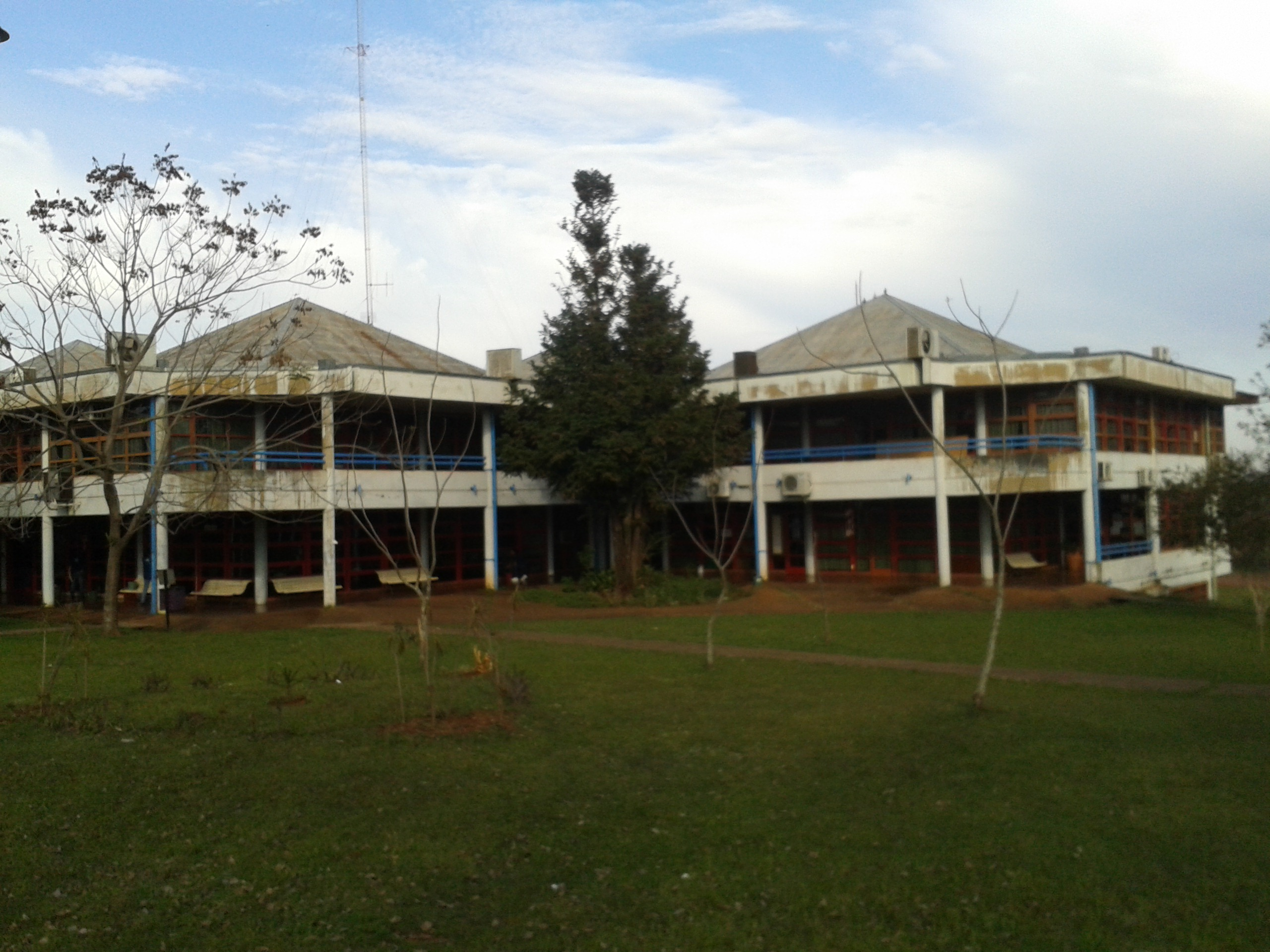 Fachada de la Facultad de Ciencias Económicas de la Universidad Nacional de Misiones